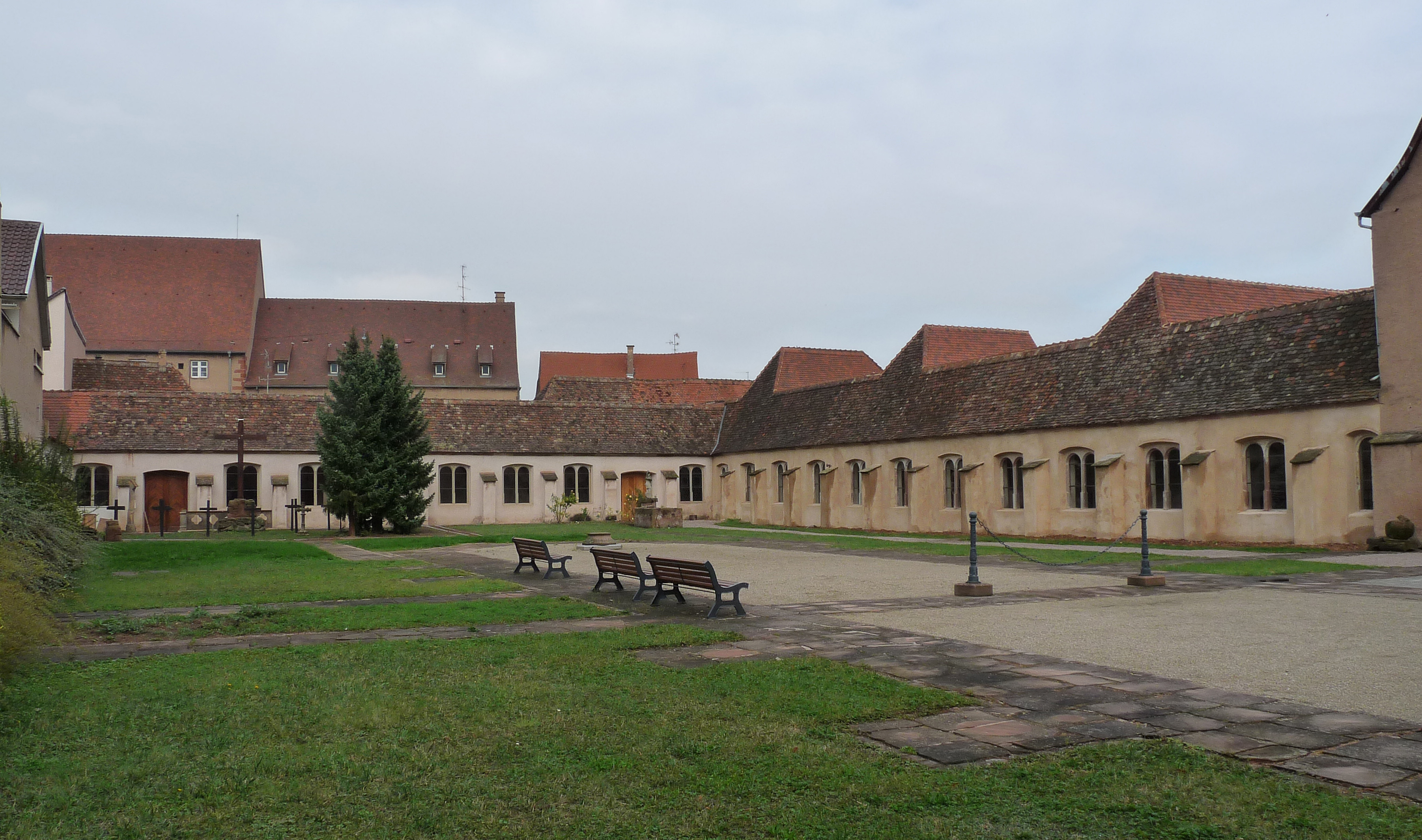 Chartreuse de Molsheim (Bas-Rhin)